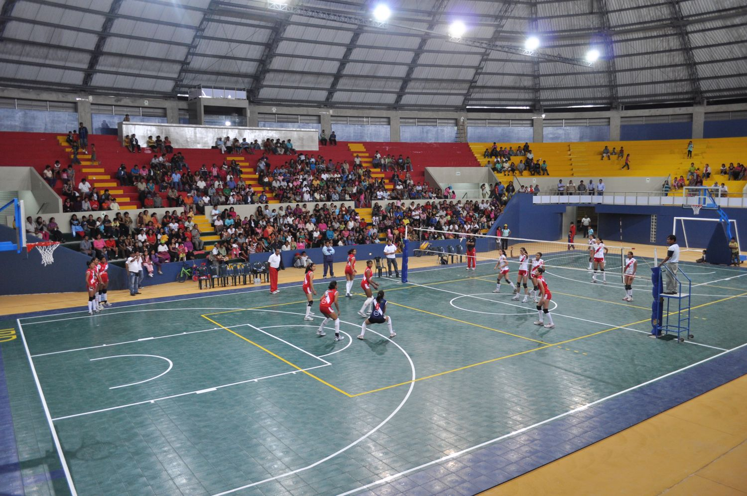 Foto del interior del Coliseo Cerrado de Huacho durante un partido de voley inaugural de los seleccionados nacionales Infantil y de Menores de vóleibol, celebrada el 29 de diciembre del 2010 que encabezó el presidente del Gobierno Regional de Lima, Dr. Luis Custodio Calderón, y su par del Instituto Peruano del Deporte, Ing. Arturo Woodman Pollit.